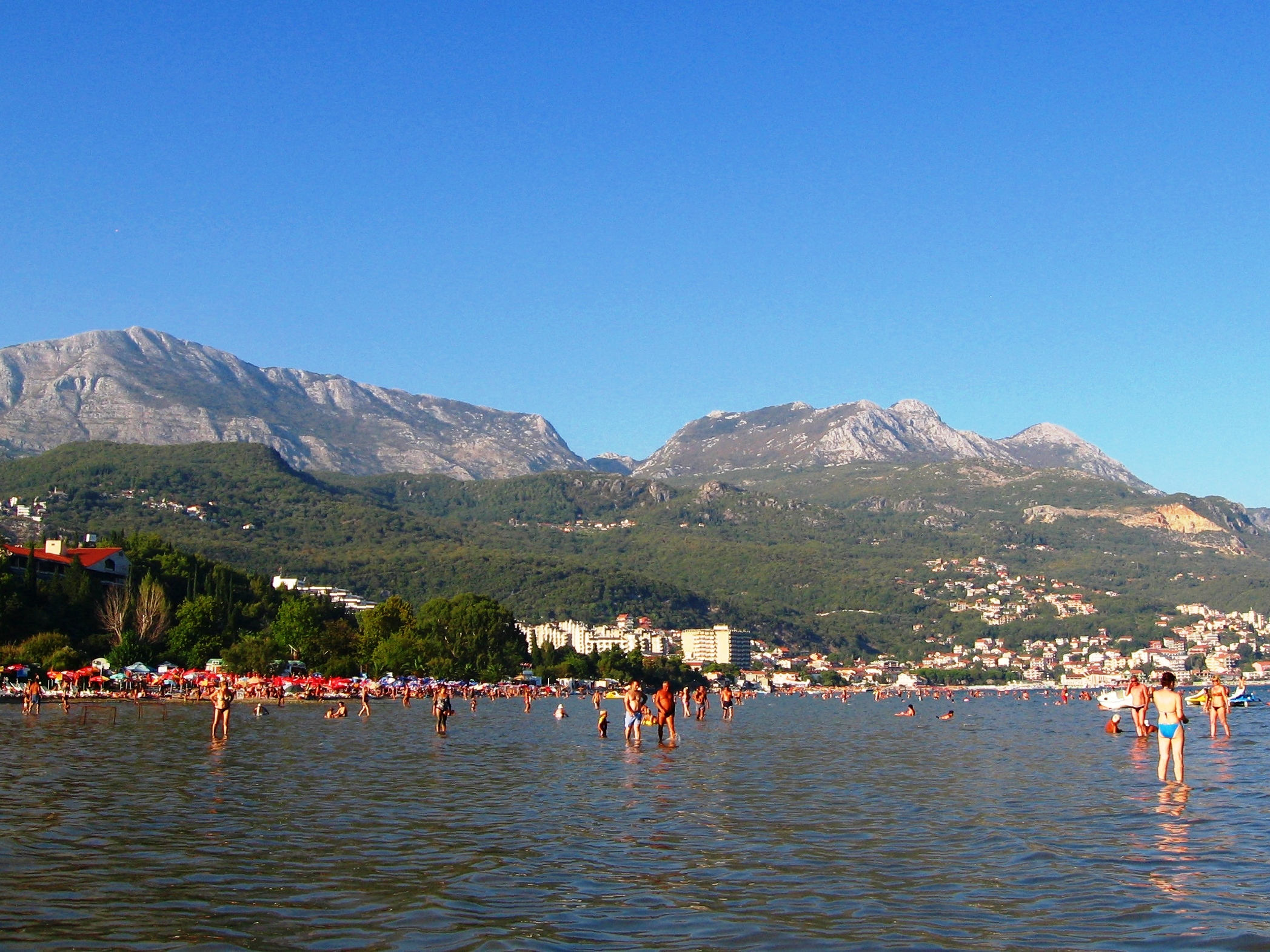 Igalo. Panorama